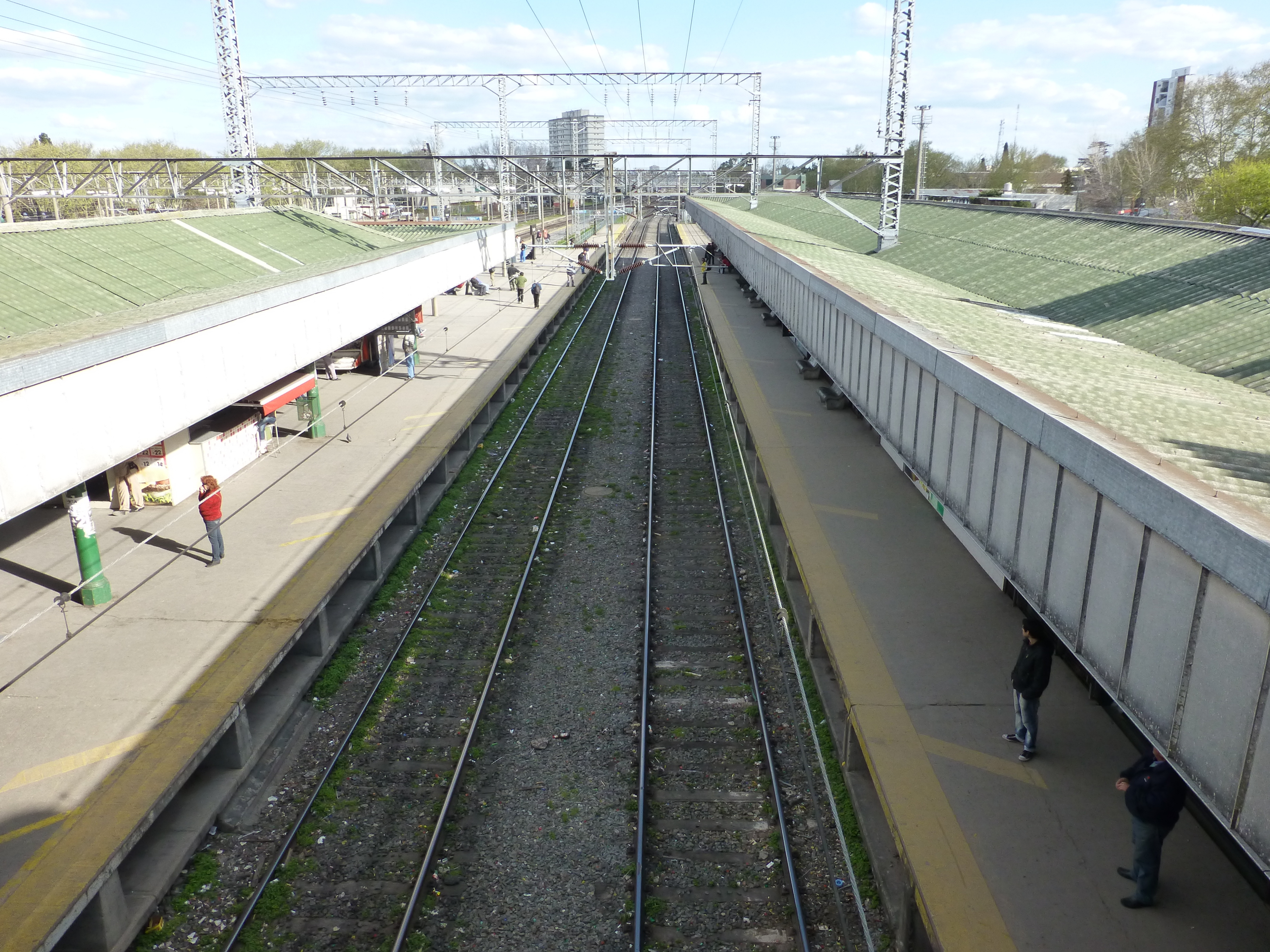 Andenes de la Estación Temperley, Buenos Aires